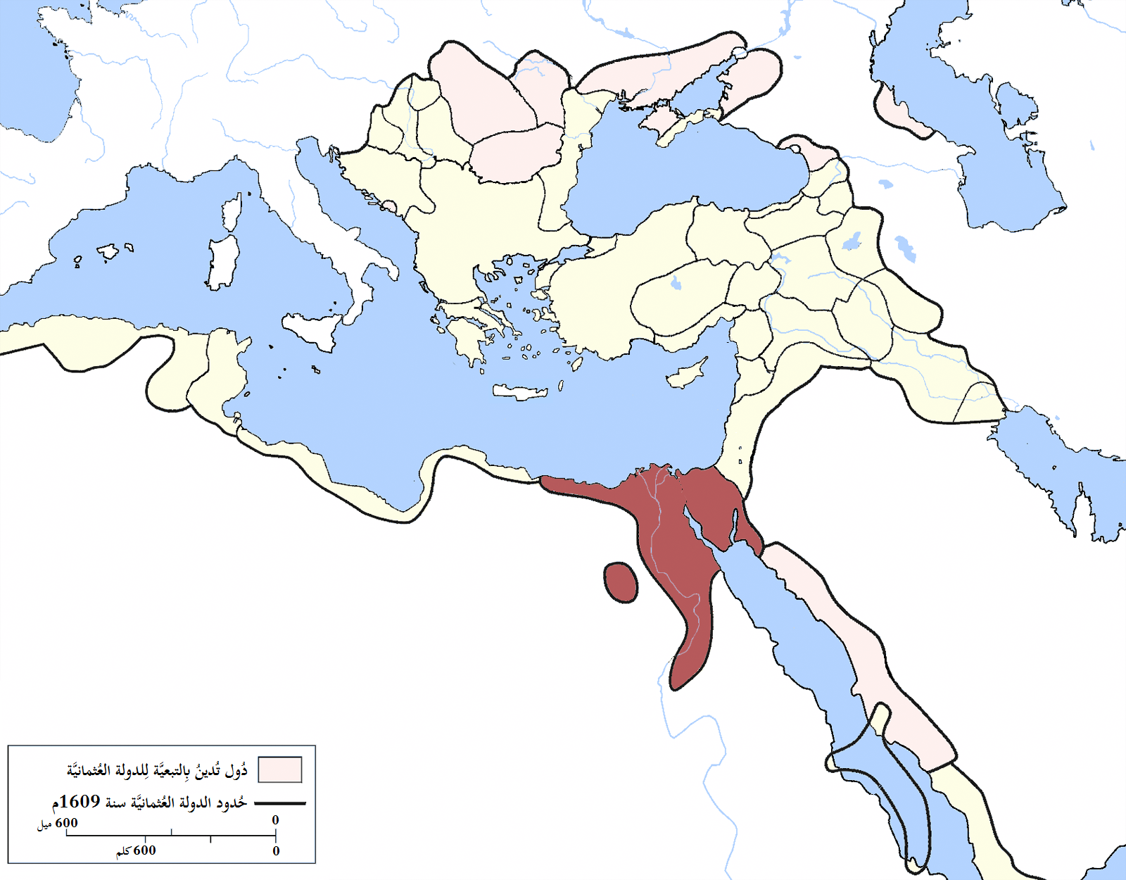 خريطة إيالة مصر في الدولة العُثمانيَّة سنة 1609م.